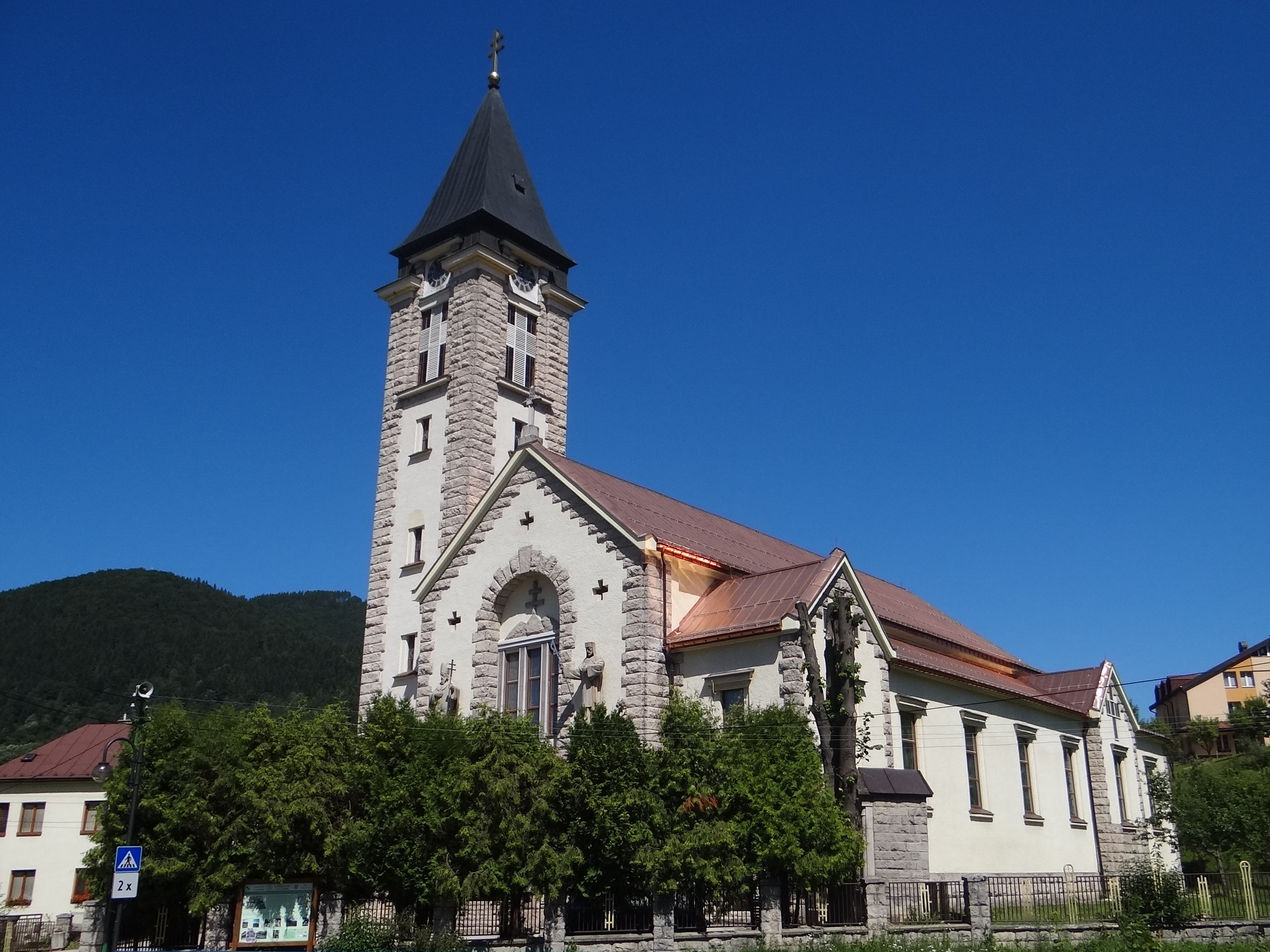 Terchová